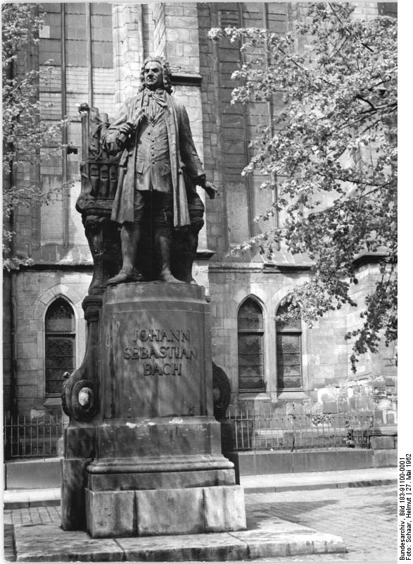 Zentralbild-Schaar Sd-At. 27.5.1962 Zur Vorbereitung des 38. Bachfestes und der 750-Jahr-Feier des Thomaherchores Am 21.5.1963 beginnen in Leipzig die Feierlichkeiten zum 38. Bachfest sowie zum 750jährigen Bestehen des Thomaherchores. UBz.: Das J. S. Bach-Denkmal auf dem Thomakirchhof vor der Thomakirche.